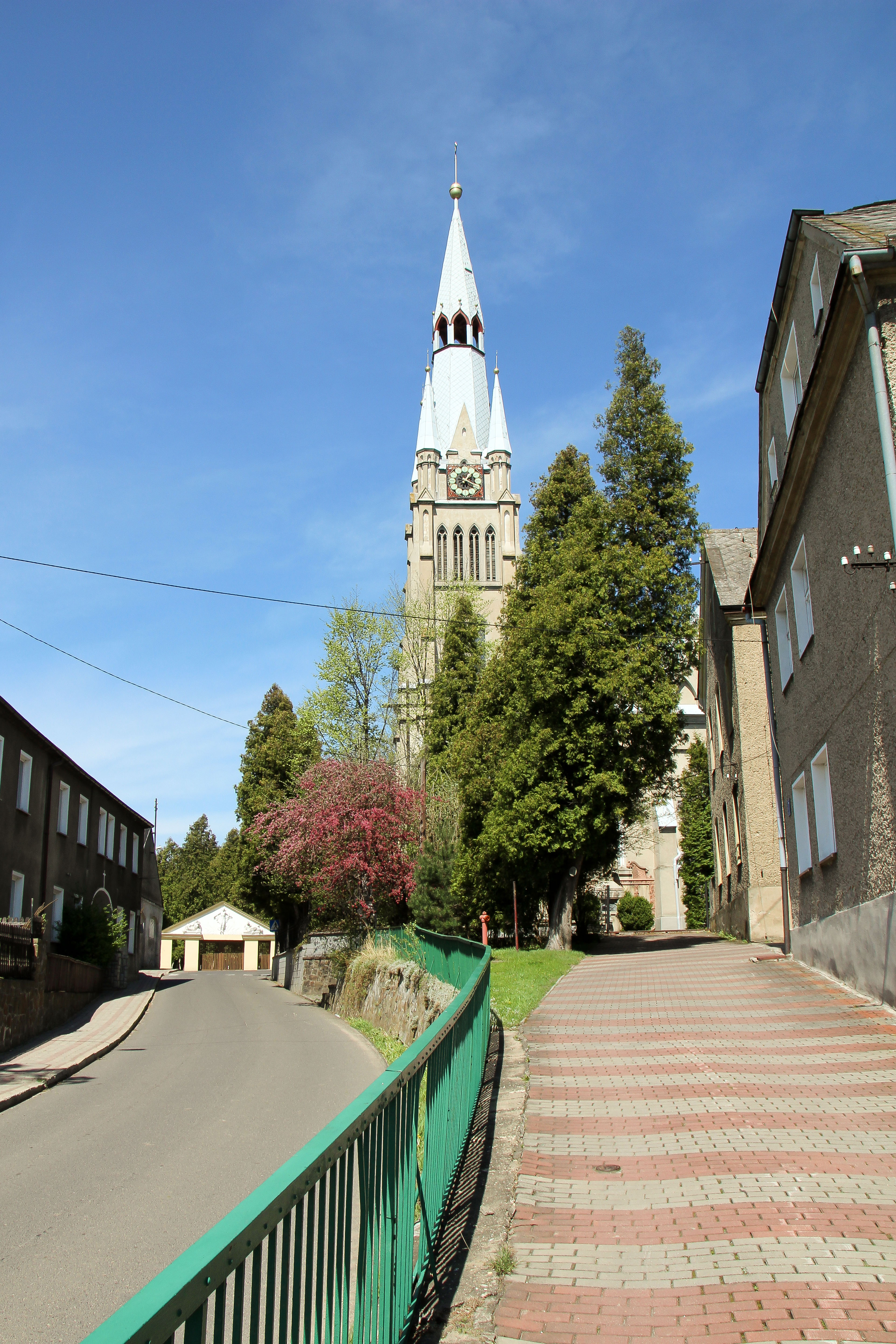 Branice, ul. Kościelna - kościół parafialny p.w. Wniebowzięcia NMP, XIII, XIX/XX w. (zabytek nr 48/48 z 25.11.1948)